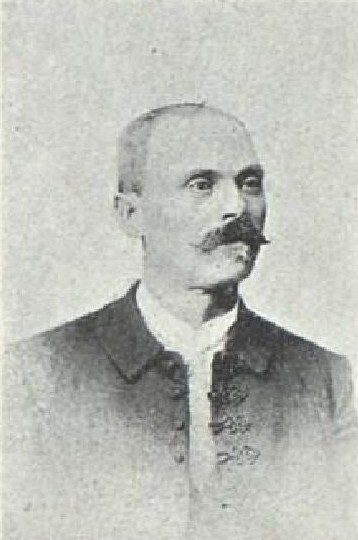 Jan Janák (1855-1934), rakouský a český sedlák a politik